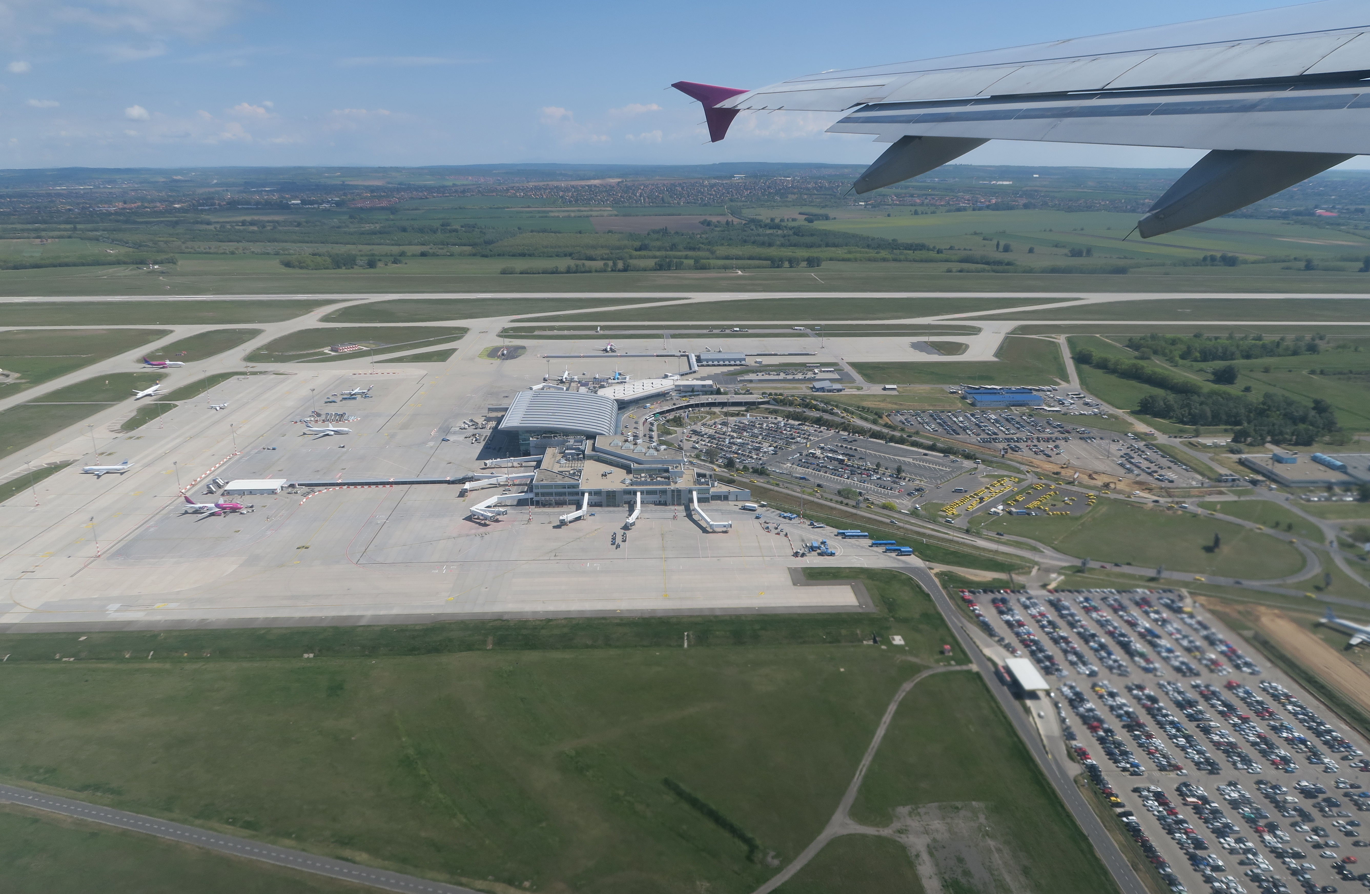 Flughafen Budapest aus der Luft